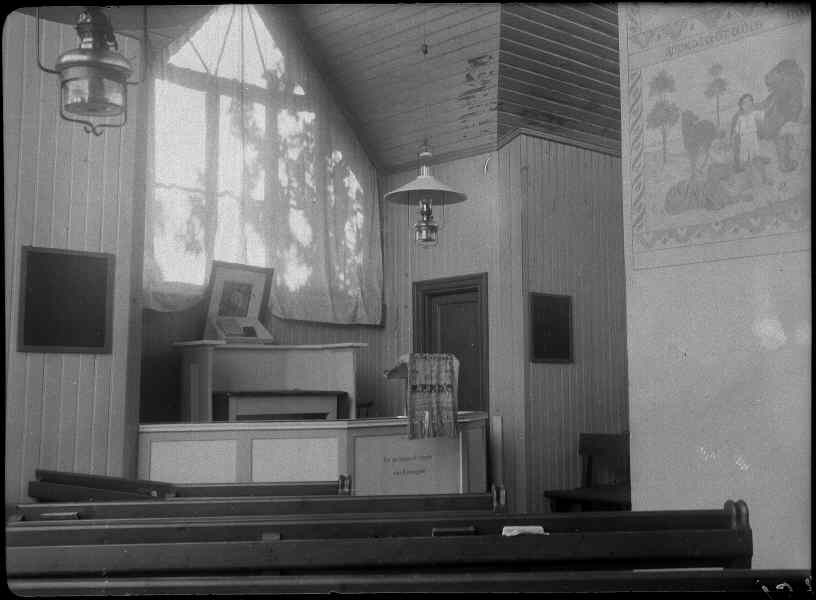 Interiör, mot koret. Snabbinv. Kategori: (02) InteriörerInteriör, mot koret. Snabbinv.